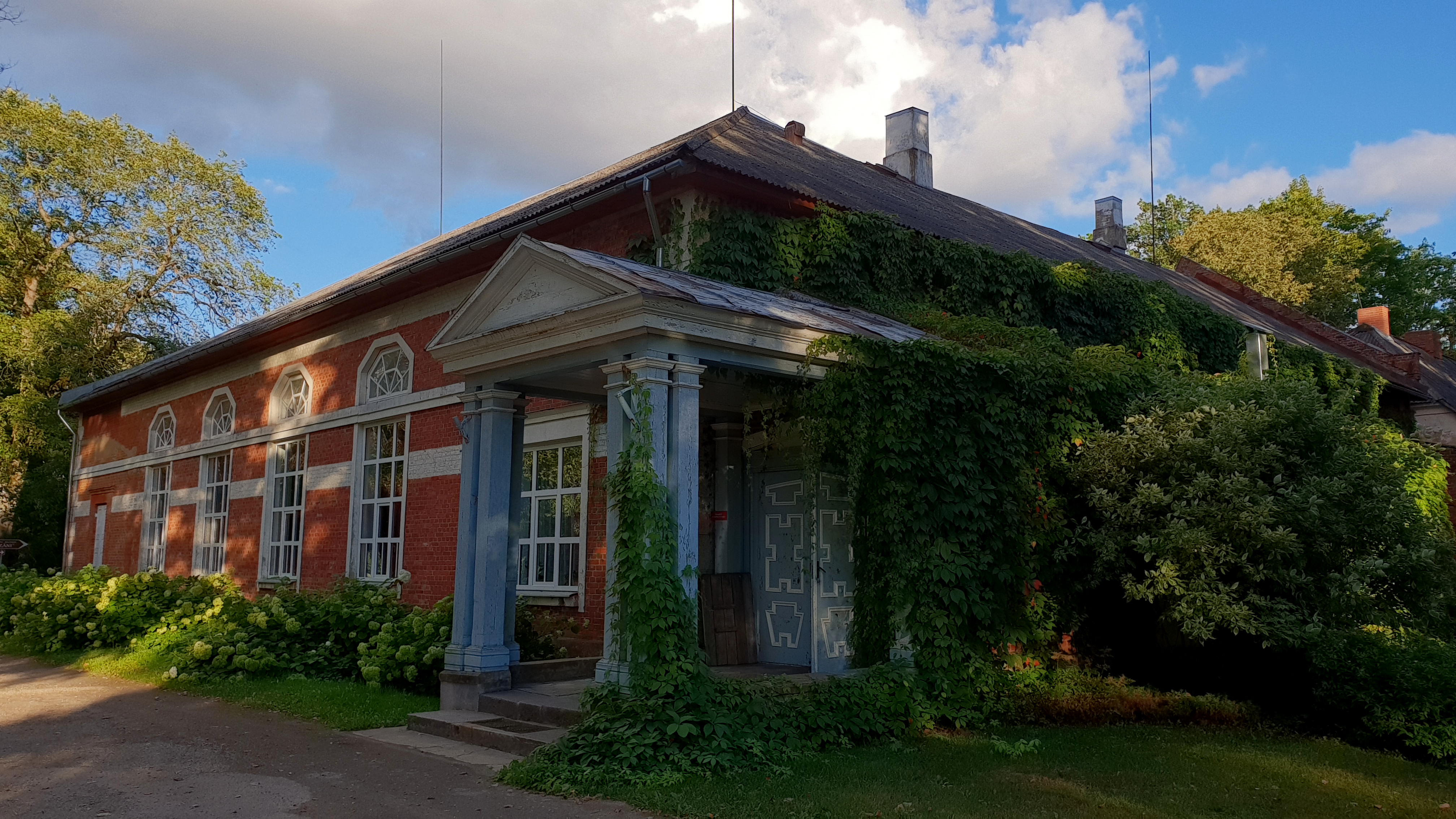 Bormaņi mõisa peahoone 2018. aastal